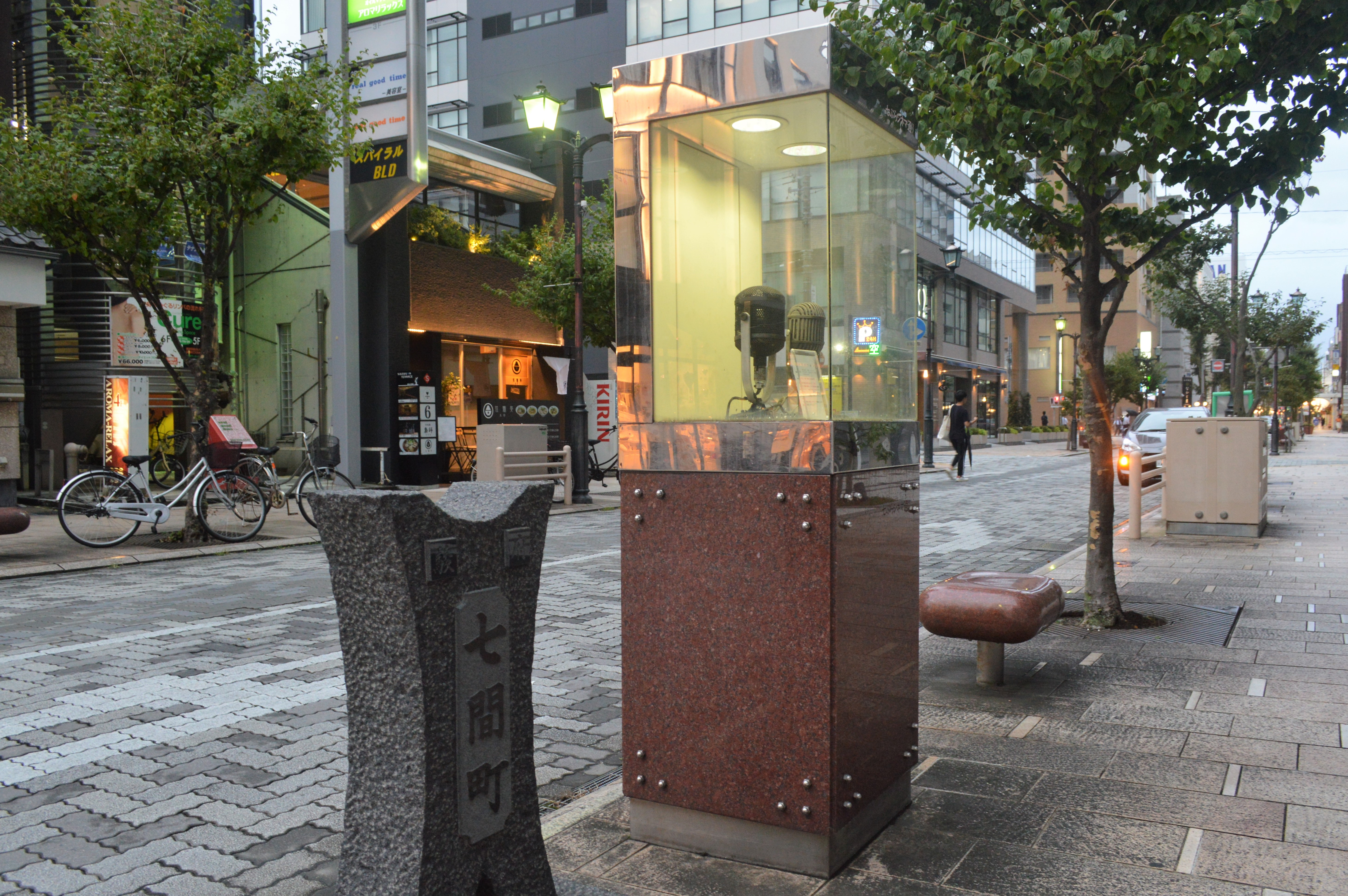 静岡市葵区七間町にある「七ぶらシネマ通り」。